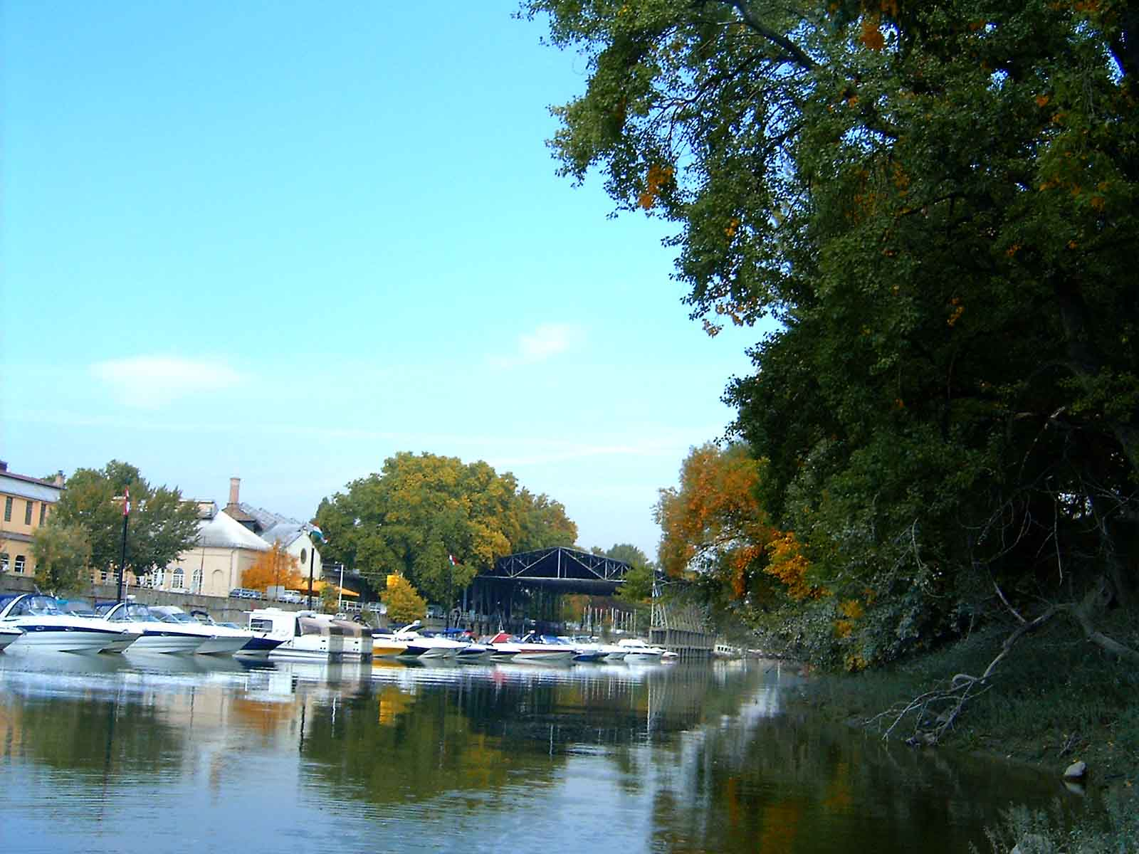 Hajók az Óbudai-szigeten, más néven Hajógyári sziget (Budapest, III. kerület)